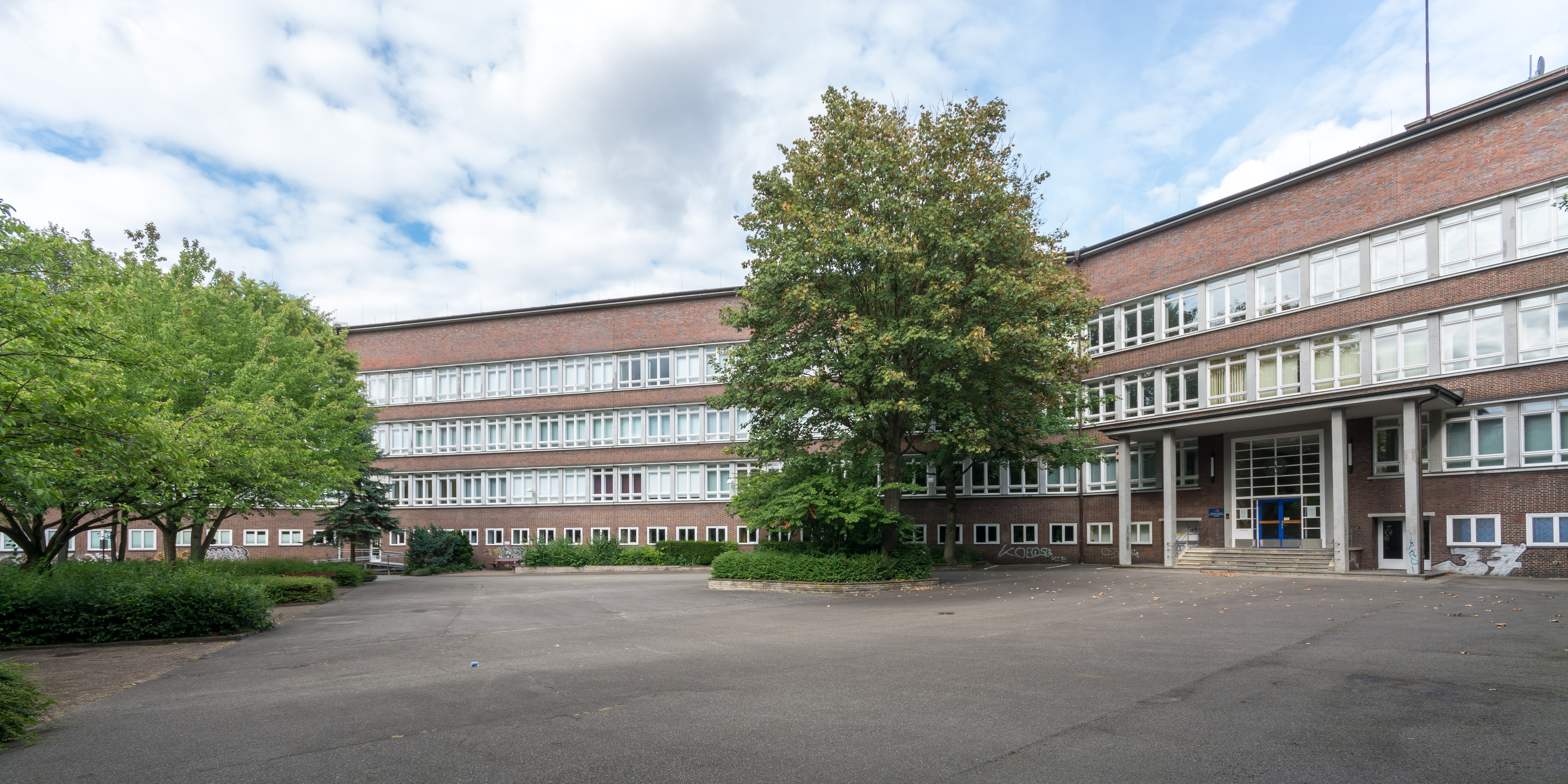 Ehemaliges Kirchenpauer-Gymnasium, Hammer Steindamm 129 in Hamburg-Hamm. This is a photograph of an architectural monument.